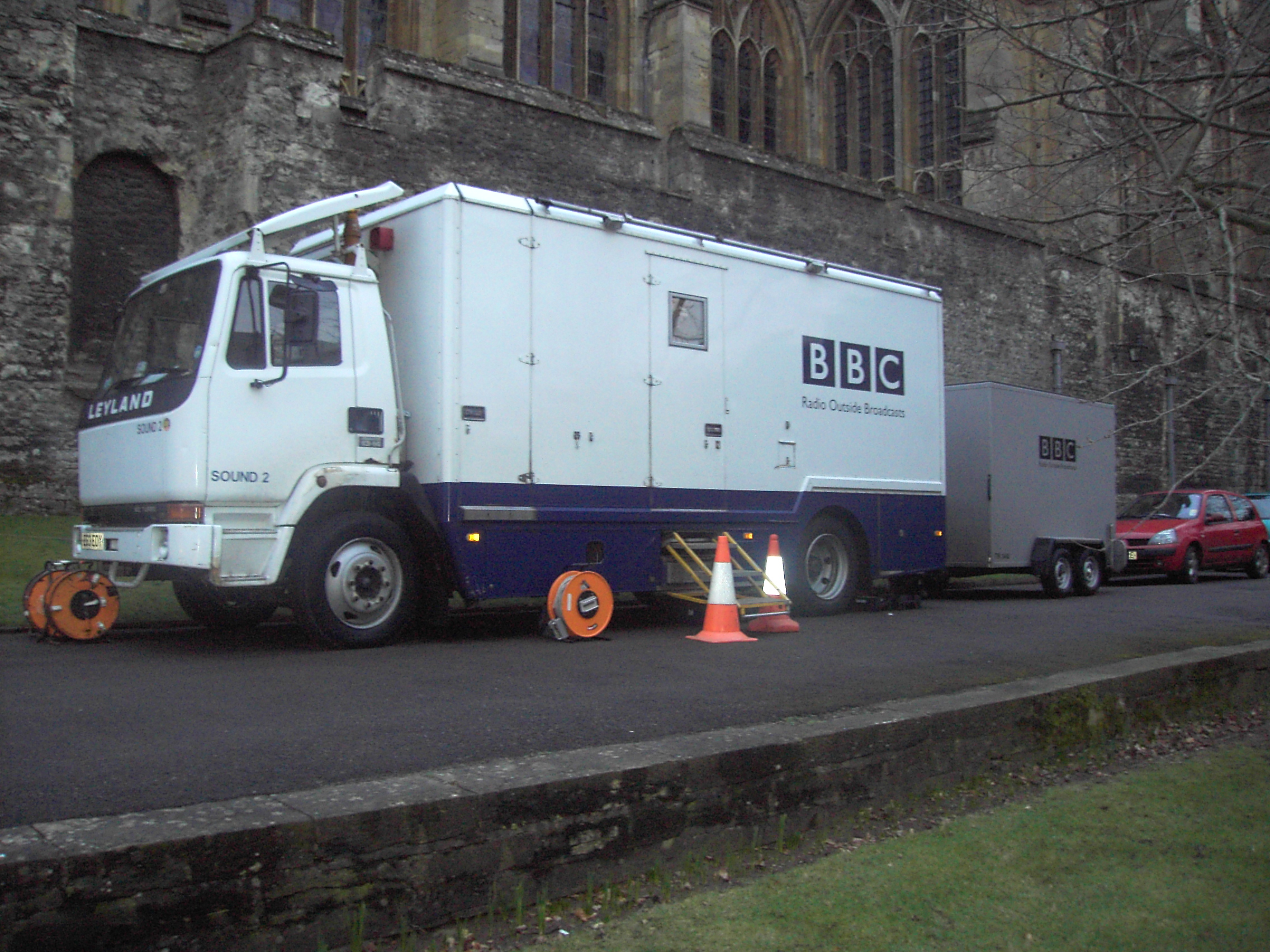 A BBC Radio outside broadcast van